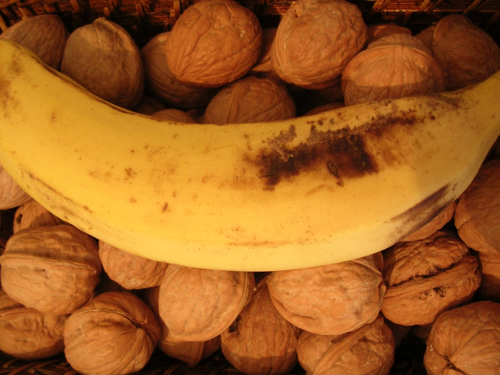 Plátano y nueces. Plátano de Canarias.